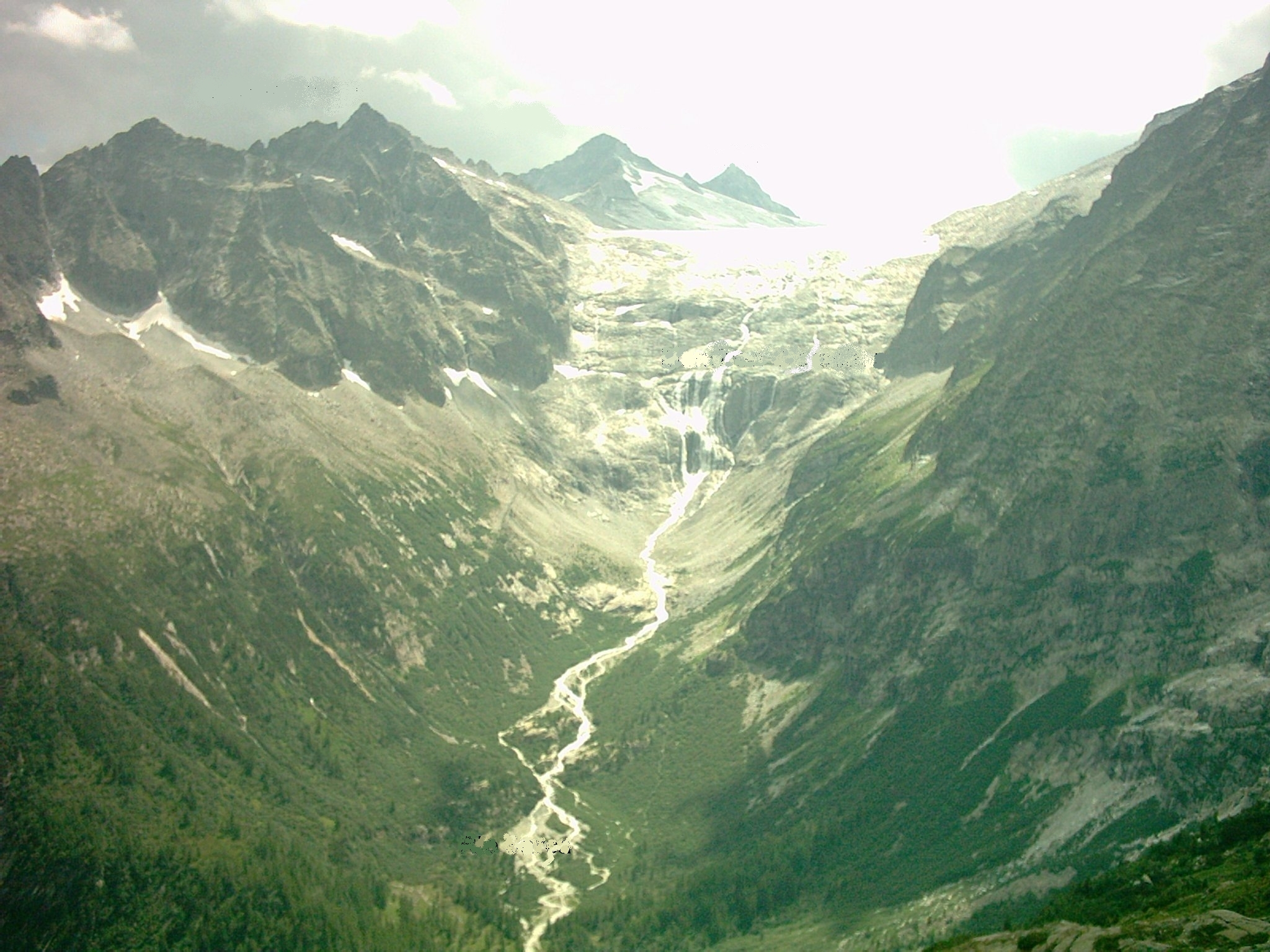 Conca del Matarot mit Crozzon di Lares (mitte) und Corno di Cavento (Trentino) Aufgenommen auf dem Weg zur Mandron-Hütte